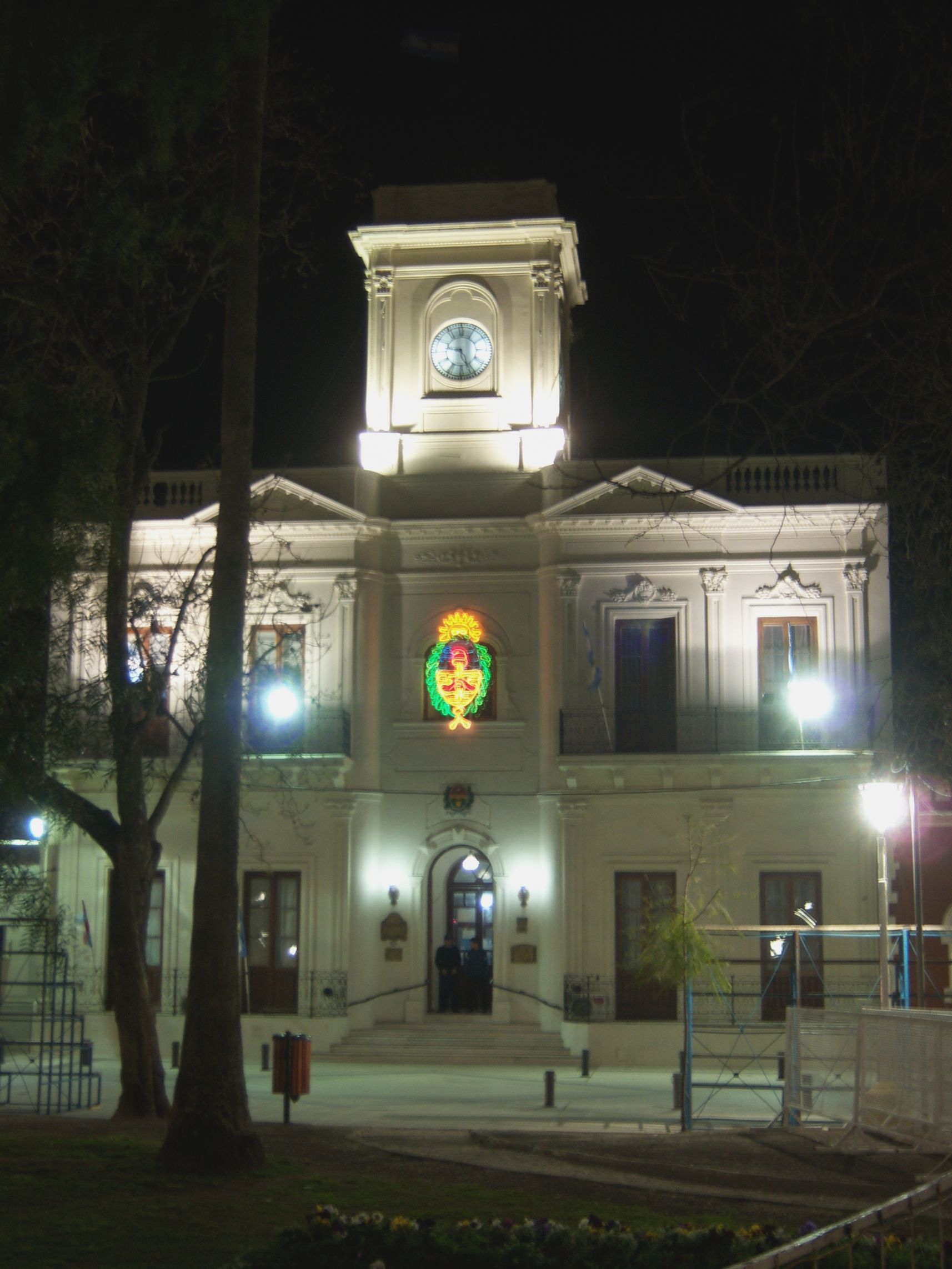 Frente del Palacio municipal de Nogoyá.